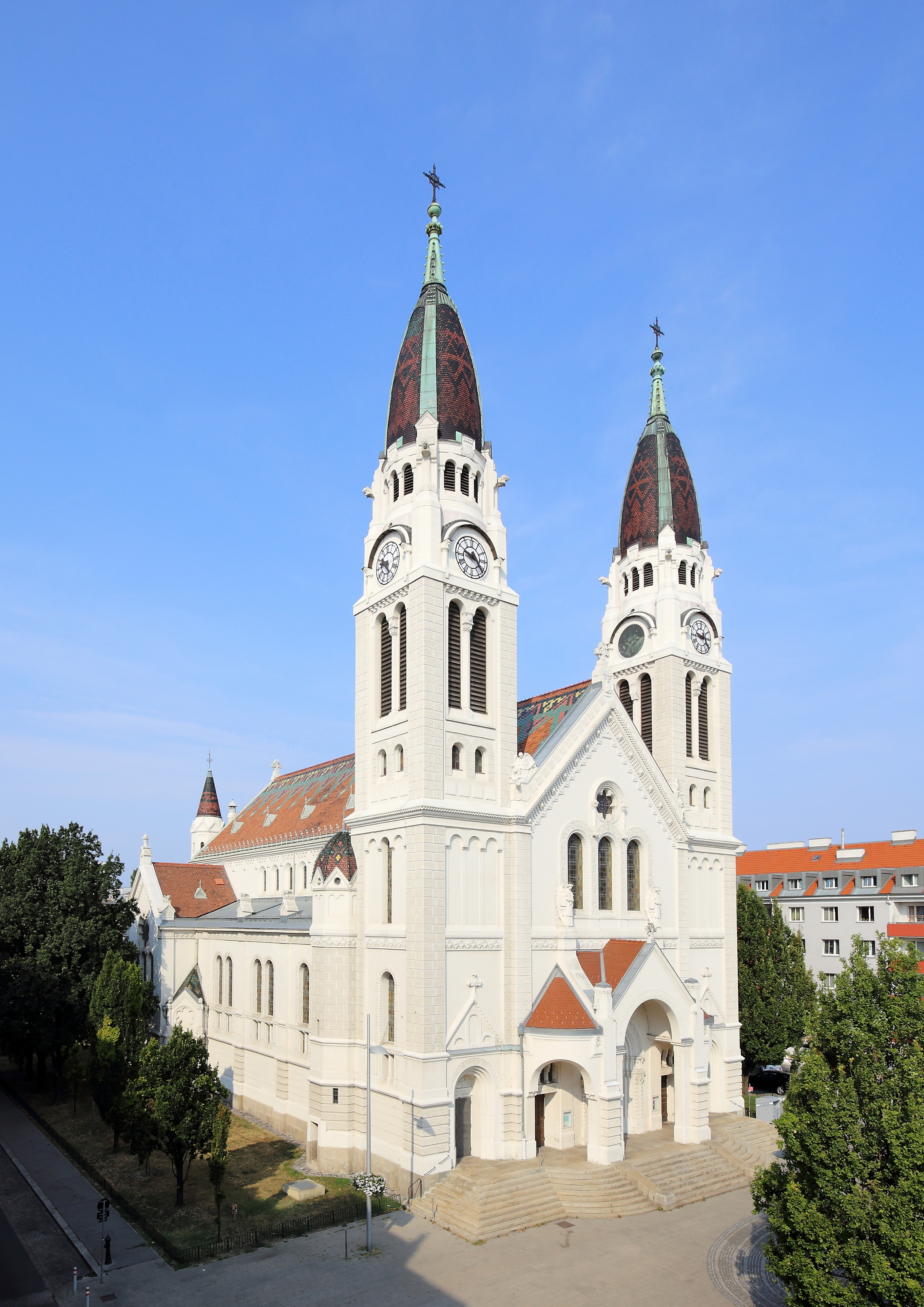 Ostansicht der röm.-kath. Pfarrkirche Neusimmering Zur unbefleckten Empfängnis im 11. Wiener Gemeindebezirkes Simmering. Die Kirche wurde von 1907 bis 1910 nach Plänen des Architekten Hans Schneider errichtet. Sie weist romanisierende Formen mit einzelnen secessionistischen Dekorelementen auf.